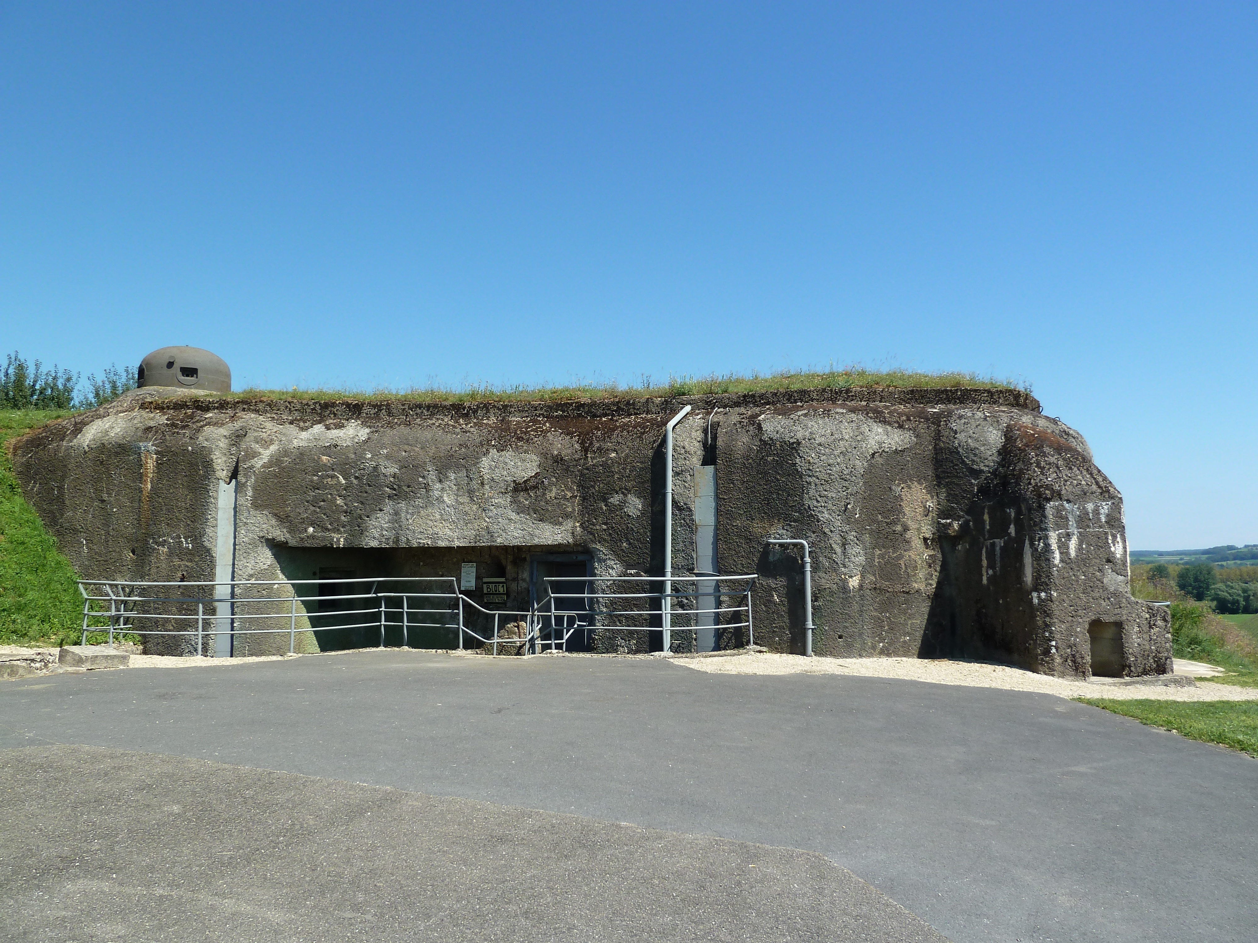 Bloc 1 : L'ouvrage de La Ferté, ouvrage fortifié de la ligne Maginot, communes de Villy et de La Ferté-sur-Chiers, département des Ardennes.